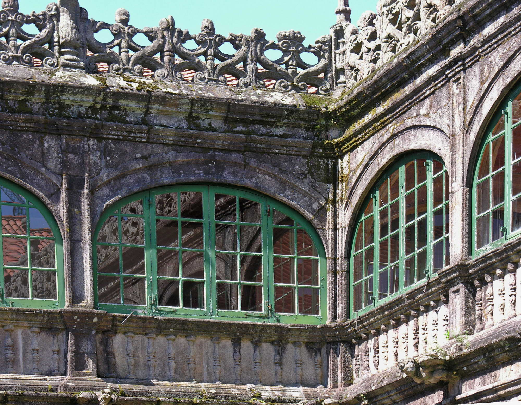 self made. Santiago de Compostela, Galicia, Spain.